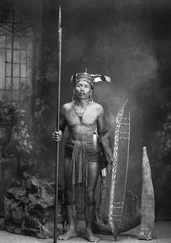 Foto. Studioportret van een Dajak met lans en schild